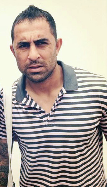 Daniel "Rolfi" Montenegro, futbolista argentino.